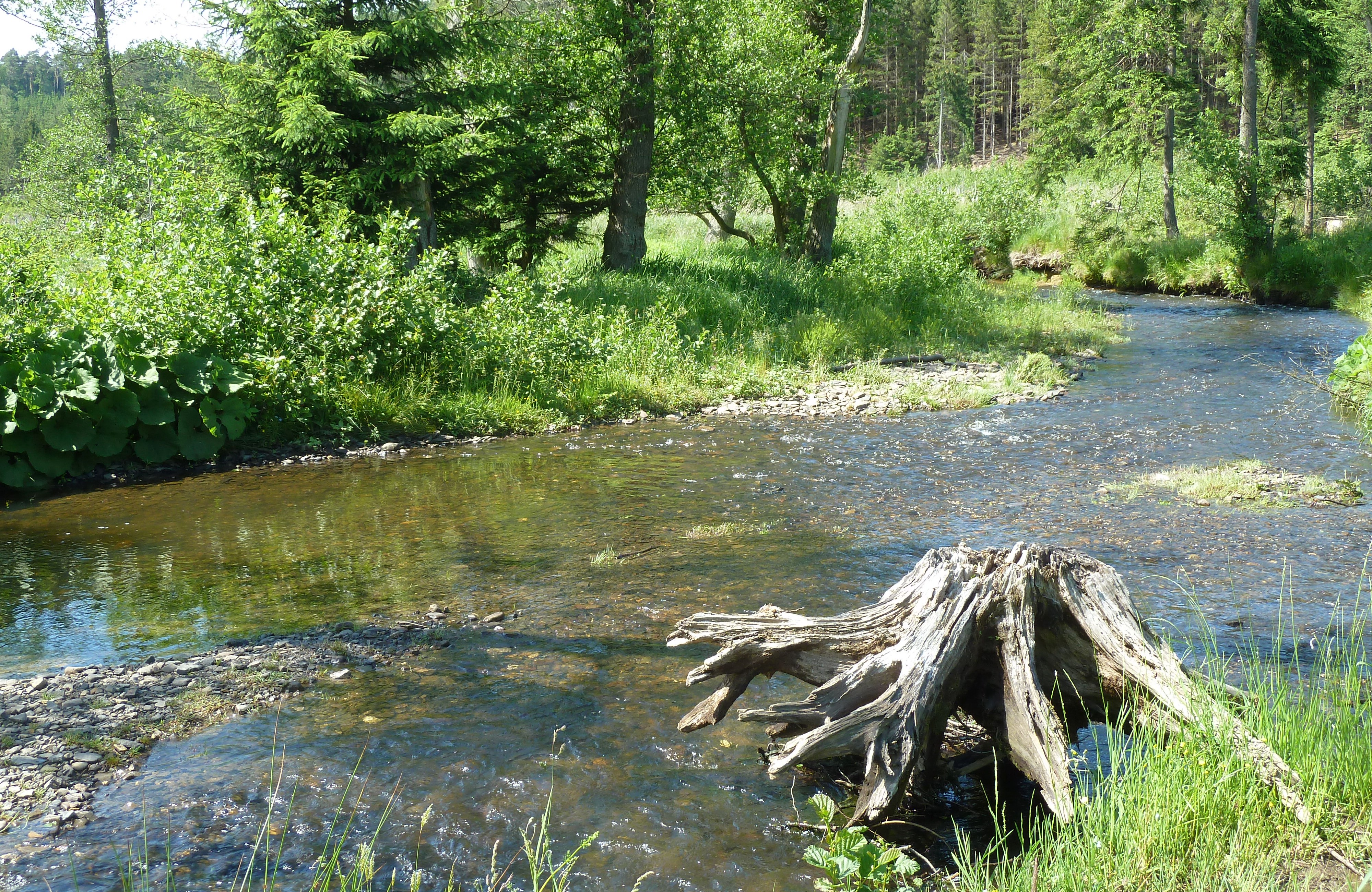 Heve - linker Nebenfluss der Möhne im Arnsberger Wald